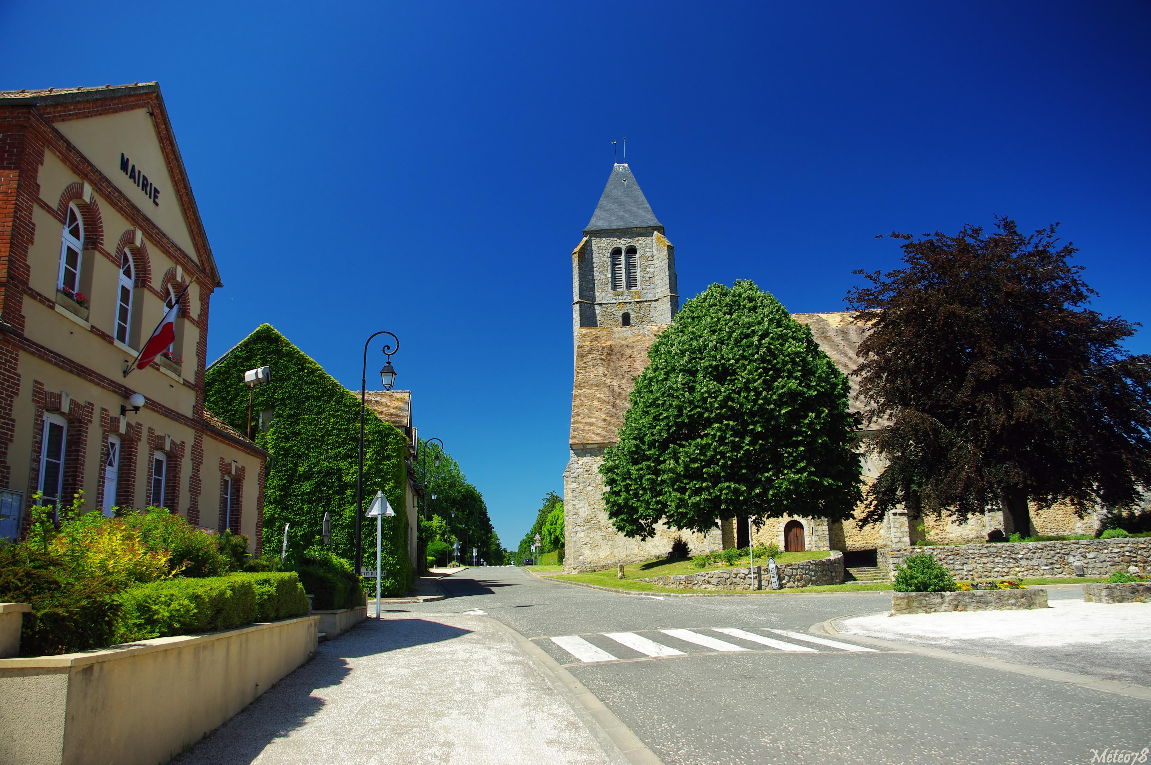 Photographie du centre de Longvilliers (dans les Yvelines) le 30 mai 2009 a 15:19